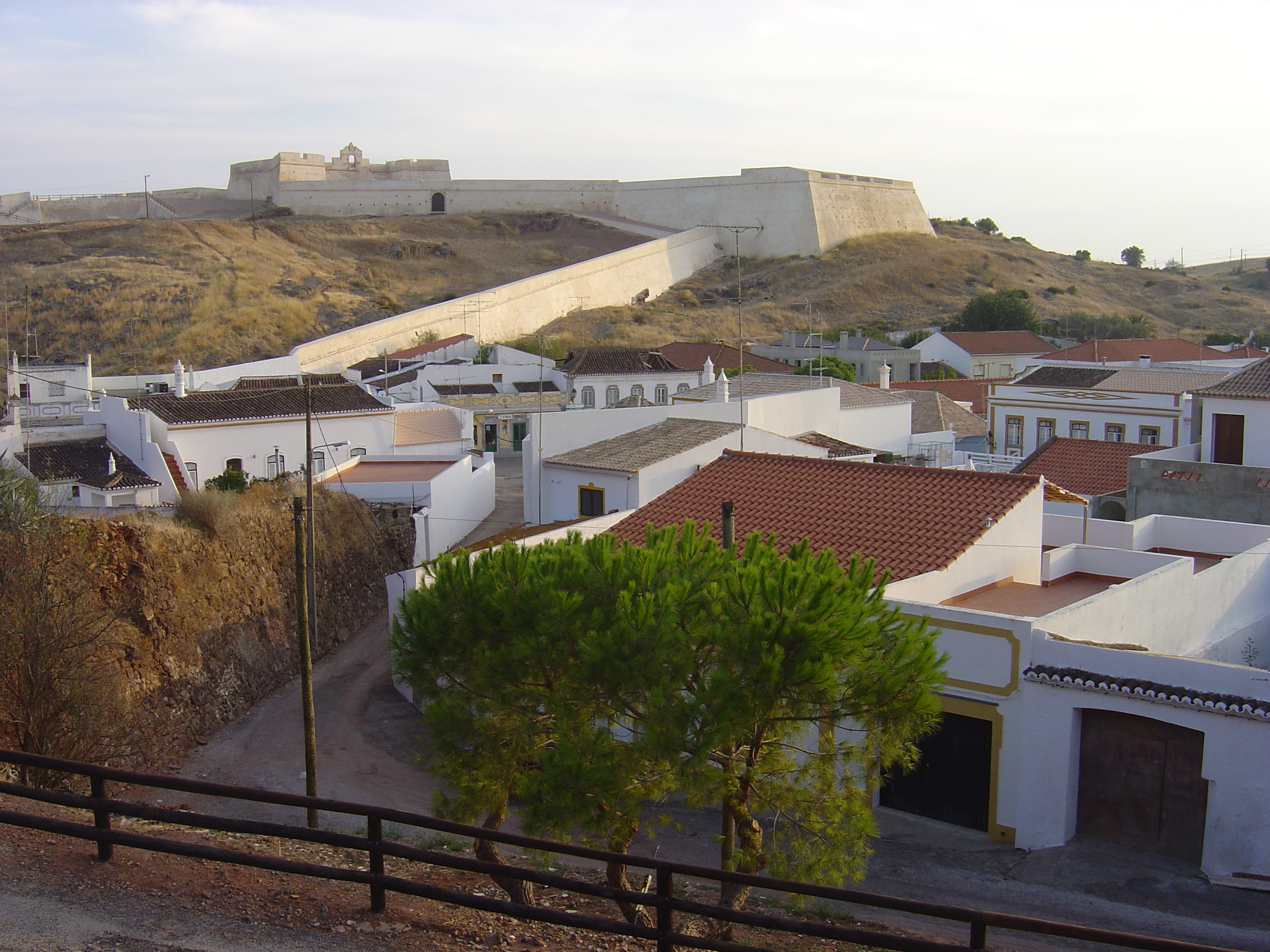 Fort, Castro Marim, Portugal